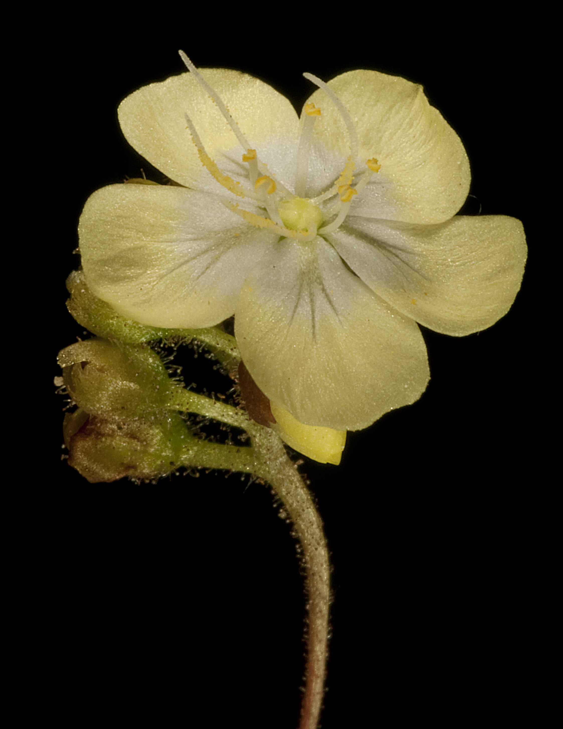 KRT4014